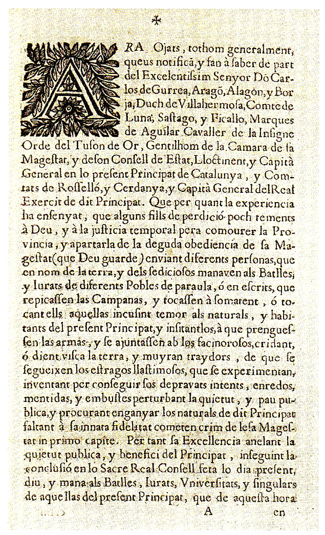 Cartell advertint sobre el risc d'involucrar-se a la Revolta dels Gorretes (1688)